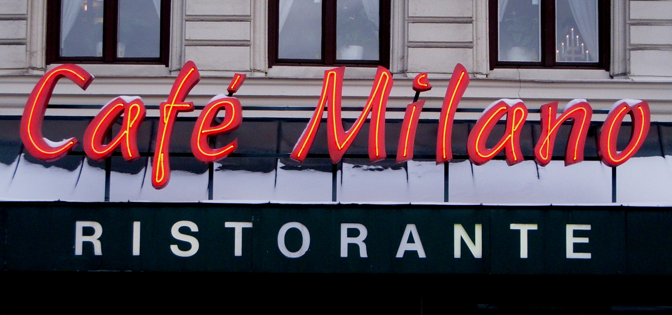 Café Milano, Stockholm, neonskylt 1:a pris för "Årets skylt" 1998, tillverkat av Focus Neon